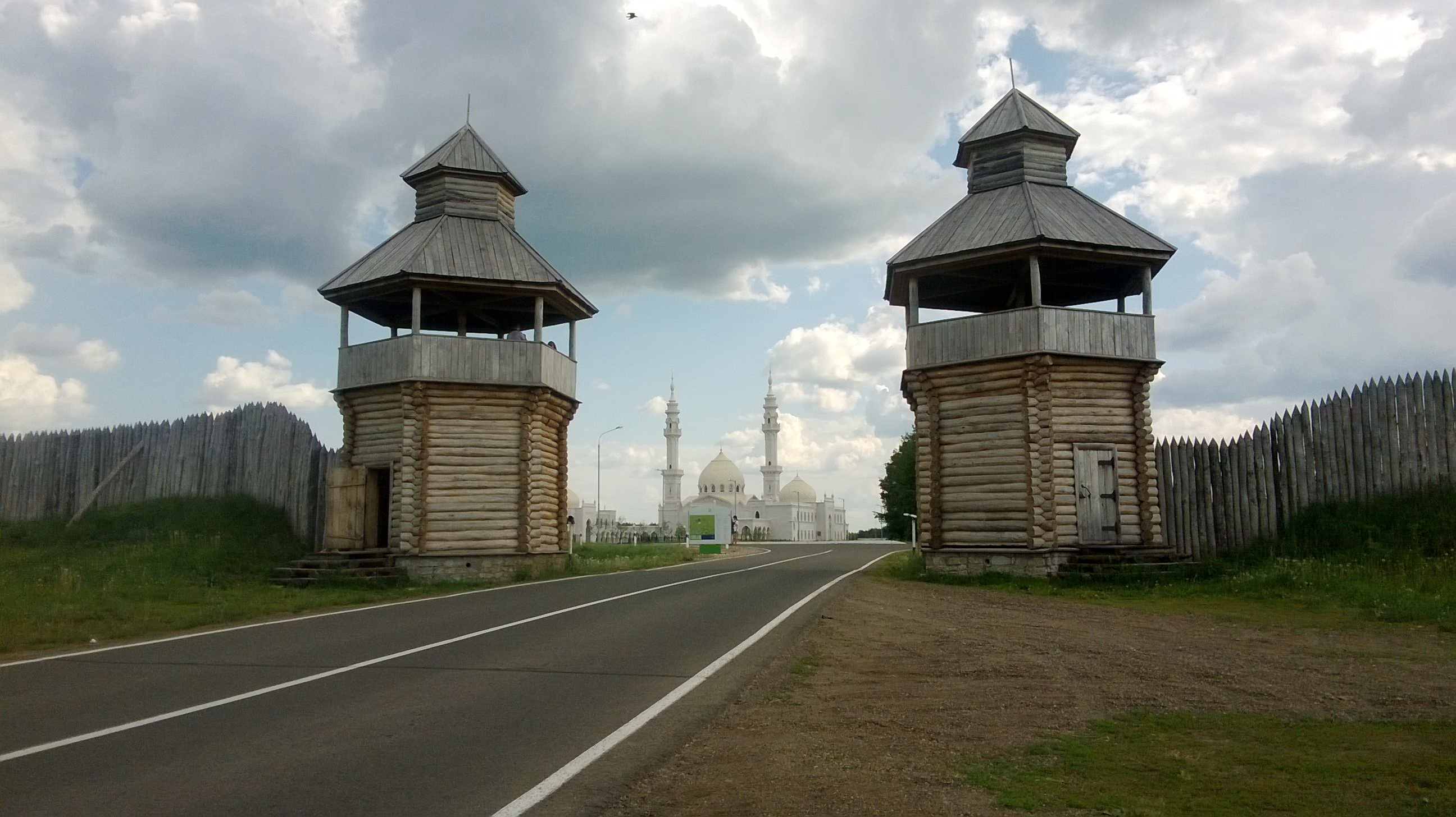 Комплекс памятников архитектуры XIII-XIV вв. на территории Булгарского городища (архитектурный комплекс «Болгары») (Республика Татарстан, Болгар, село Болгары, городище)